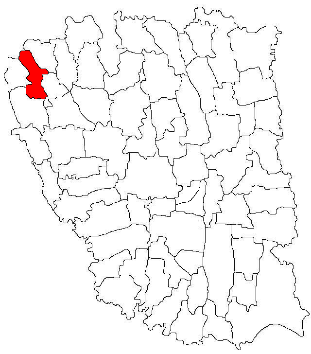 Categorie:Hărţi ale judeţului Galaţi